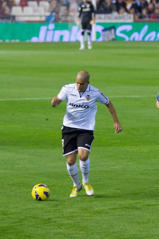 Crop de la photo "File:Sofiane Feghouli-VCF vs ESP-2012.jpg" de Victor Guttiérez Navarro. (match Valencia CF-Esp. Barcelona du 17.11.2012)